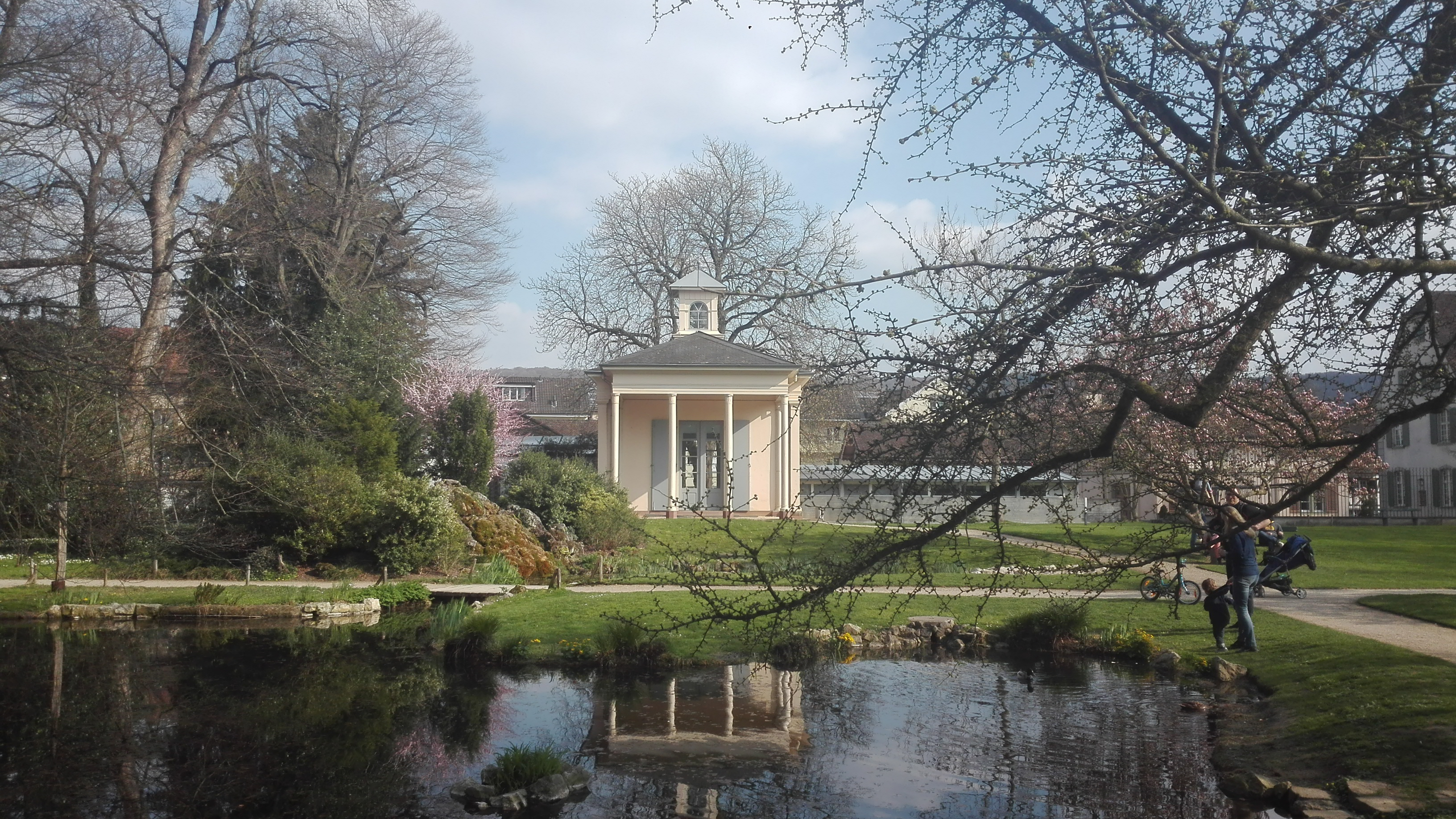 Sarasinpark in Riehen bei Basel (Orangerie und Teich)